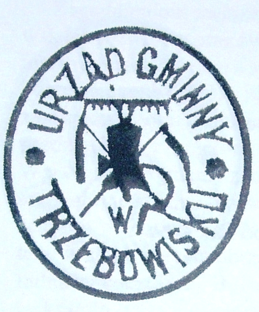 Herb wsi Trzebownisko (stary)